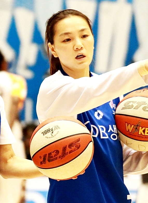 160220 여자농구 KDB생명 vs KB스타즈 직찍